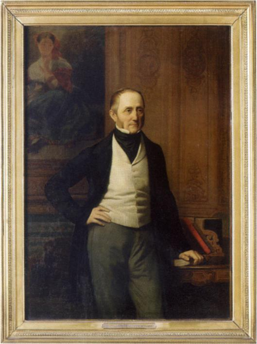 Portrait du baron Jean-Henri Hottinguer (1803-1866) posant devant le tableau Jeune fille de l'ariccia de Franz-Xaver Winterhalter